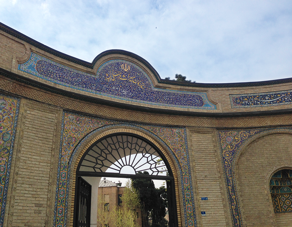 سردر ورودی عمارات مسعودیه